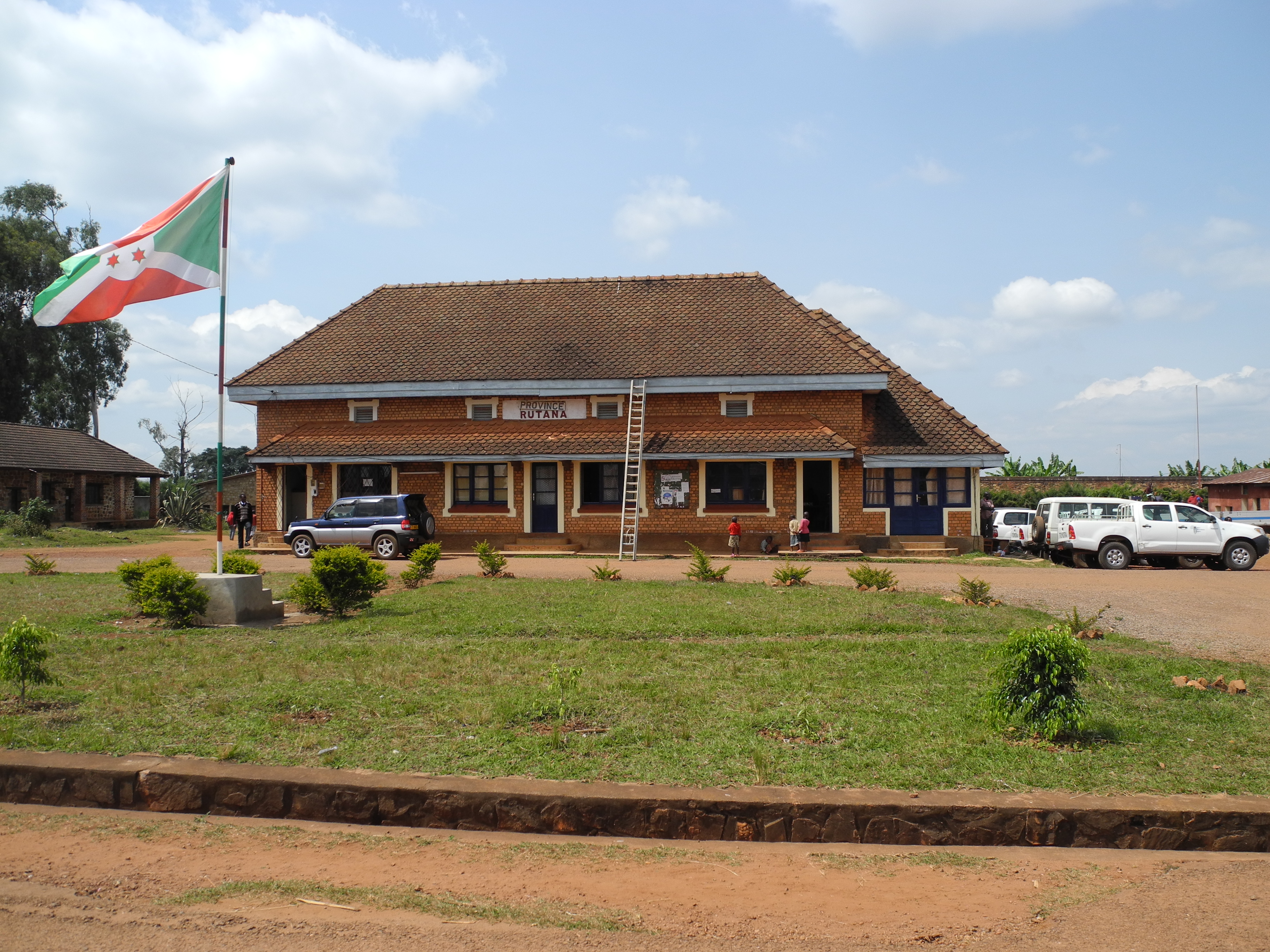 Bâtiment de la province de Rutana